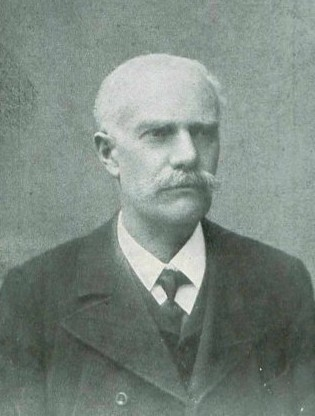 Johann Gratz (1849-1915), rakouský politik